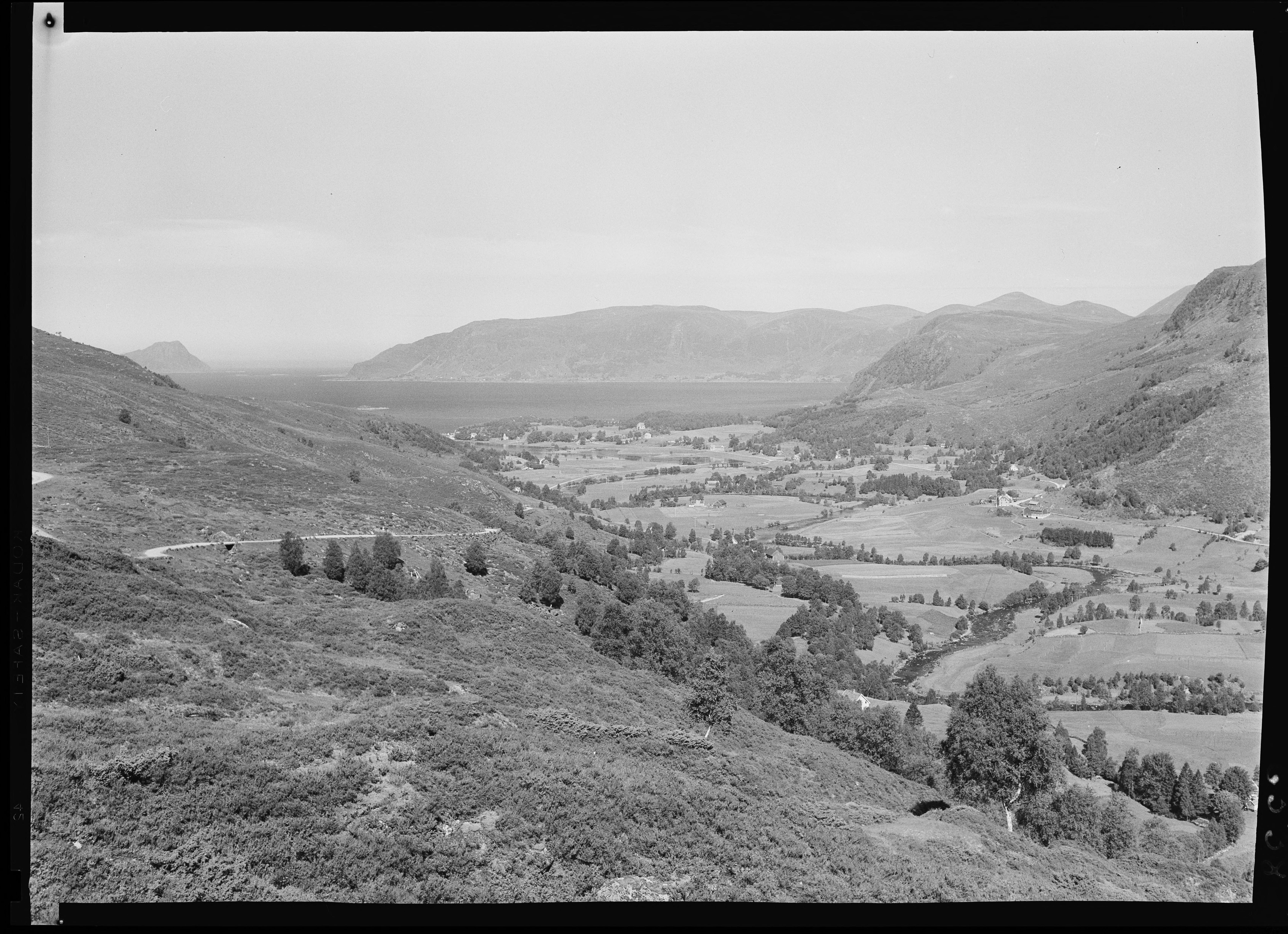 Bildet er hentet fra Nasjonalbibliotekets bildesamling. Anmerkninger til bildet var: Fotograf : ukjent Åheim, Vanylven, Møre og Romsdal